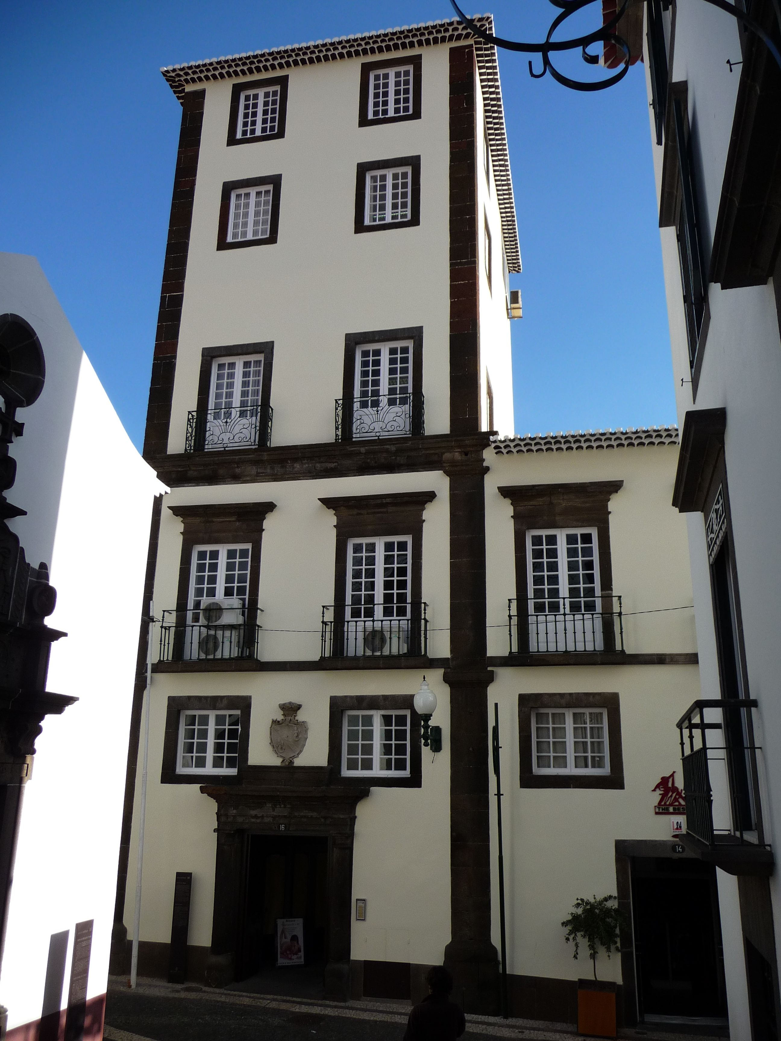 Ornelas Palace (Funchal, Madeira)